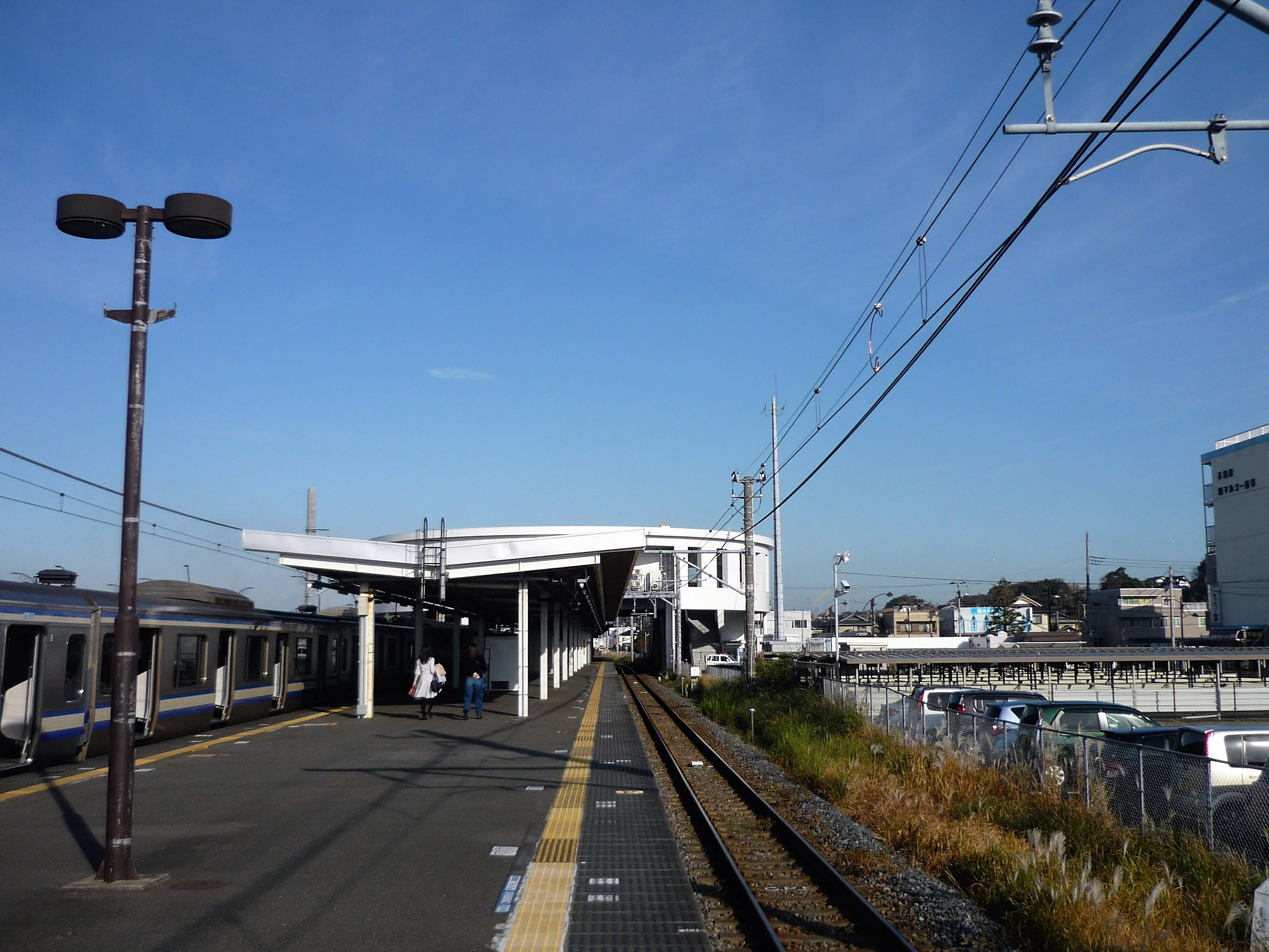 袖ケ浦駅ホーム Panasonic Lumix DMC-FS3